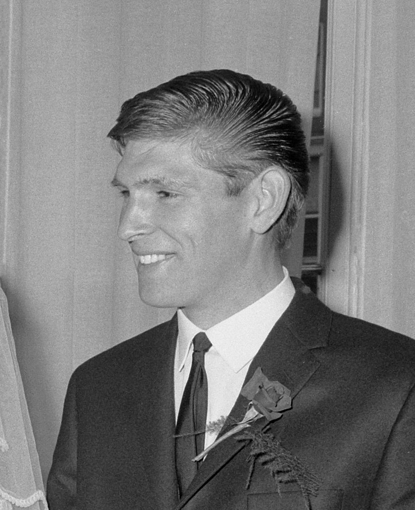 Huwelijk Cor Schuuring (wielrenner) met Rietje Schulte